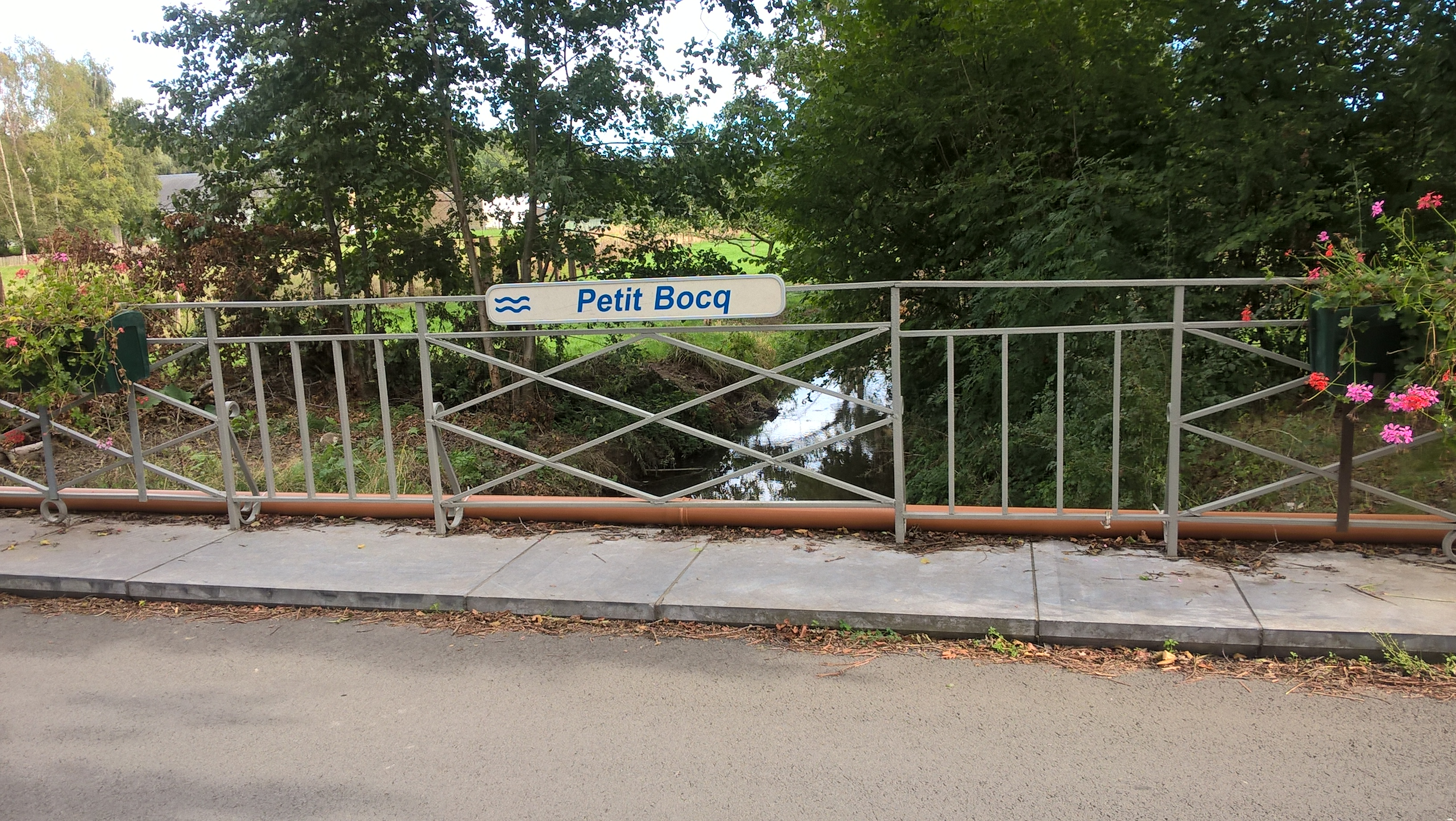 La rivière traverse le village. On voit l'eau peu profonde en amont du pont.